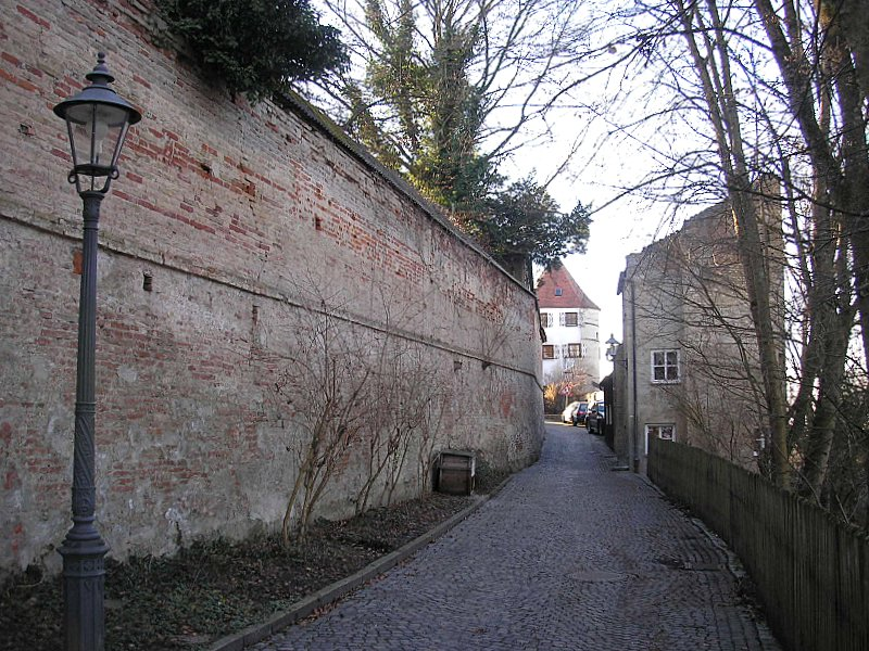 Stadtbefestigung Friedberg (Landkreis Aichach-Friedberg, Bayerisch-Schwaben). Nordwestabschnitt am Schloss. Eigene Aufnahme, Jan. 2007 / Friedberg City Walls (Bavaria, Germany). Northwestern part of the fortifications near the castle. Own photo, Jan. 2007